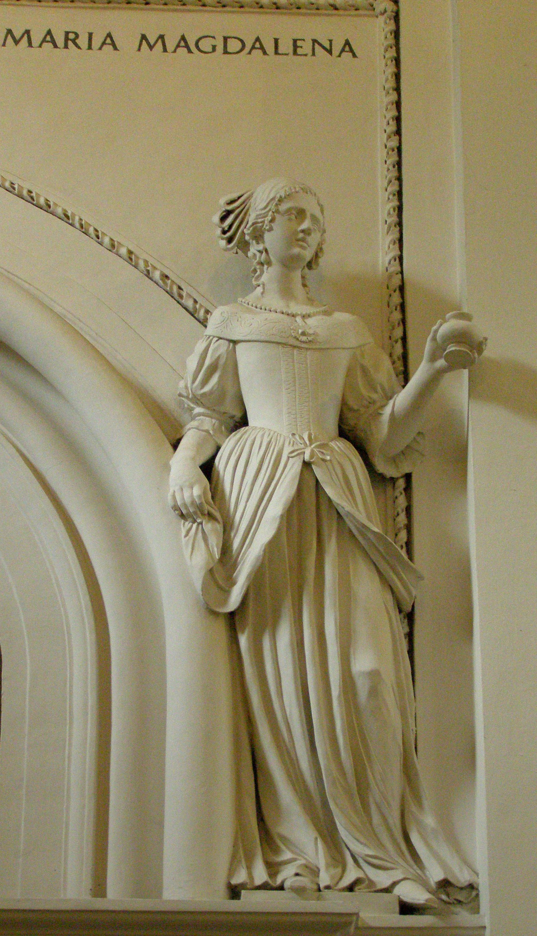 Figura Marii Magdaleny w kościele św. Piotra i Pawła na Antokolu w Wilnie